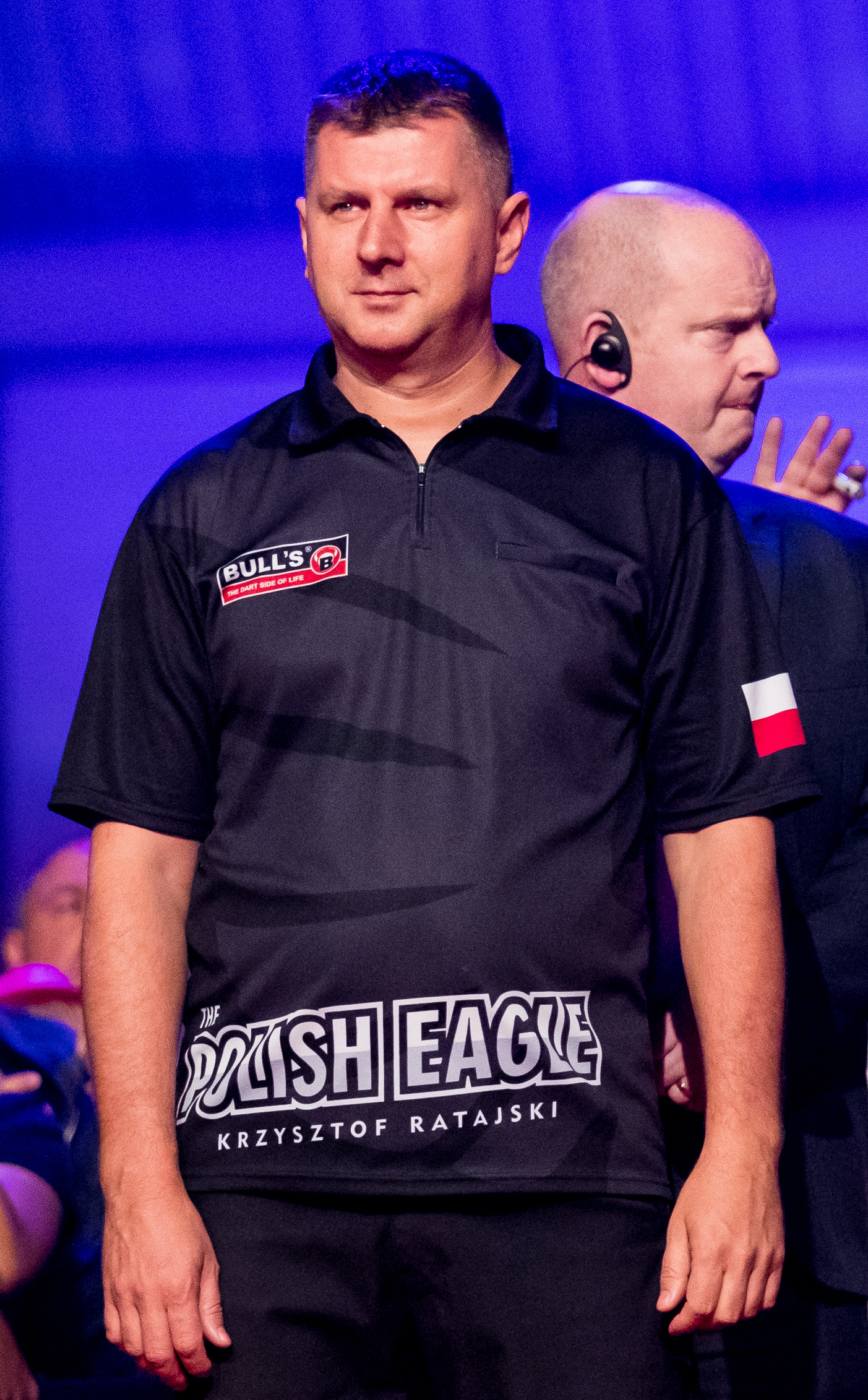 Michael van Gerwen 6:5 Krzysztof Ratajski during PDC Europe Darts Matchplay at Maimarkthalle, Mannheim, Baden-Württemberg, Germany on 2019-09-08, Photo: Sven Mandel